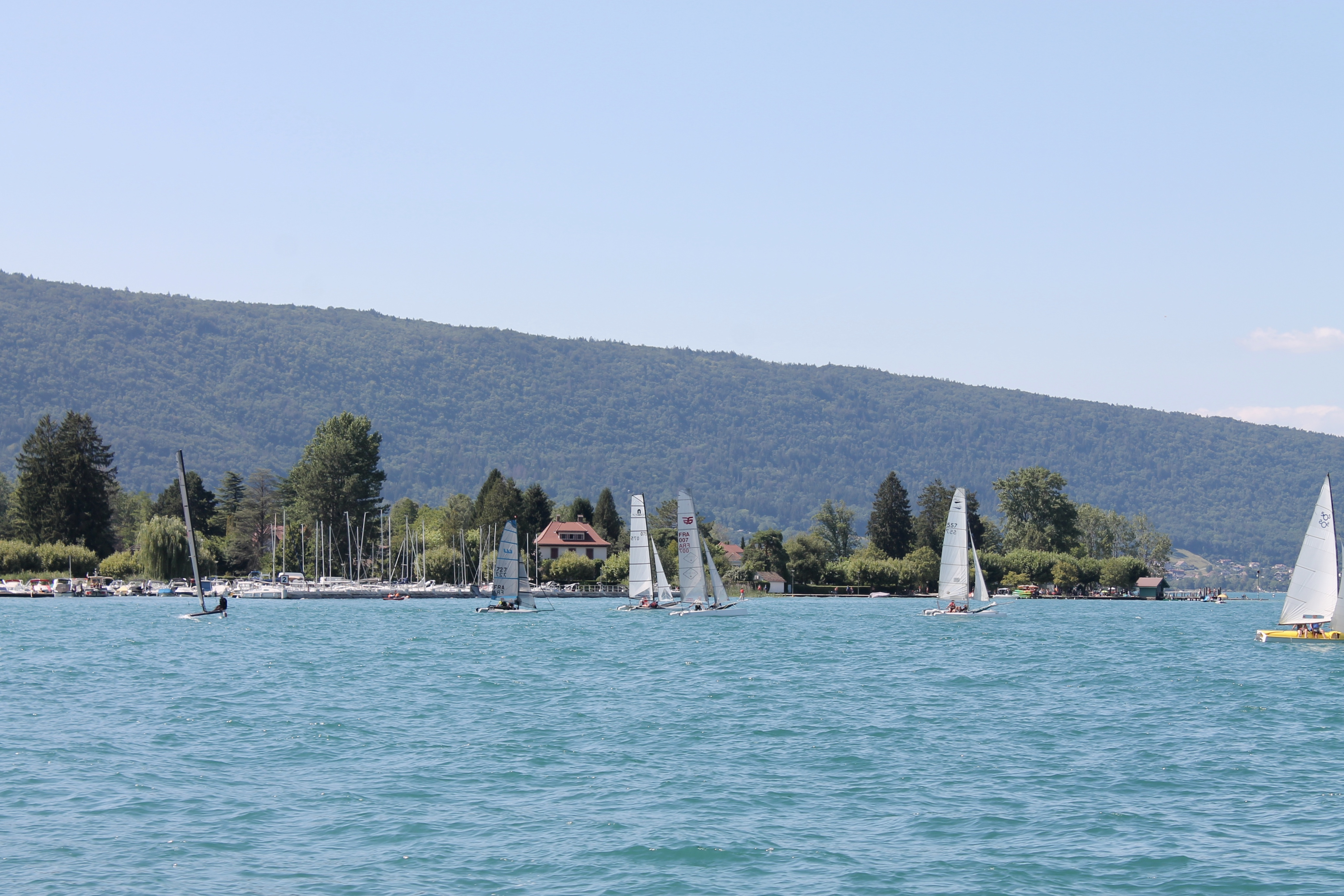 Vue du port de Saint-Jorioz (2019).